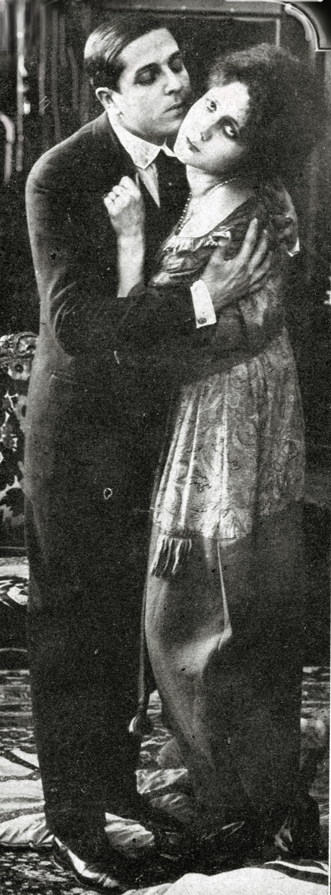 La casa che brucia - regia Mario Corsi - produzione Tespi Film Roma, 1919 - foto scena: Pietro Pezzullo e Lina Millefleurs